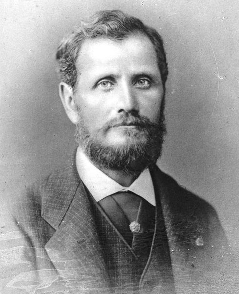 Malarz Stanisław Chlebowski (1879)